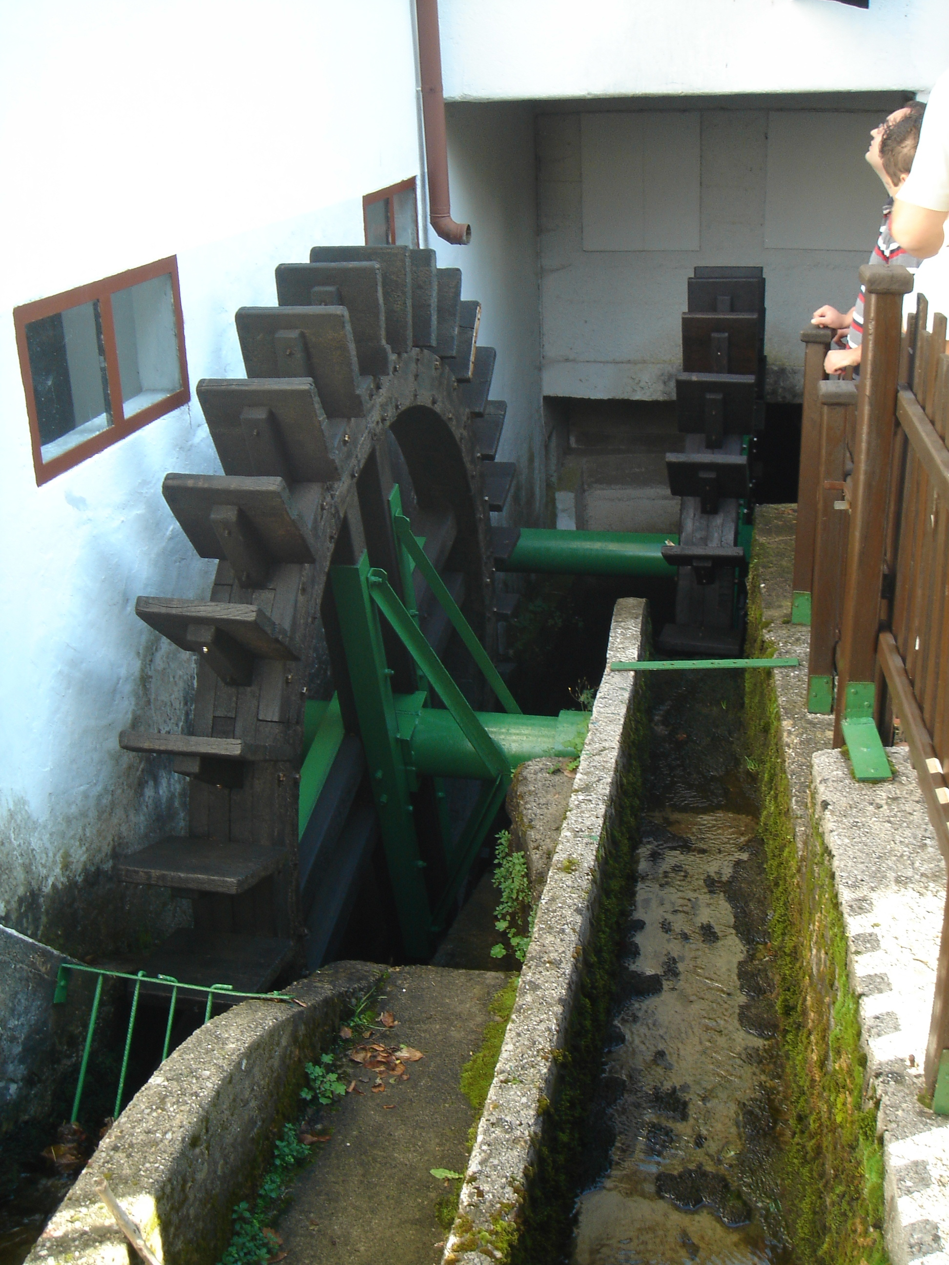 Gašparov malin u Martinovom Selu. Slikao: Đole